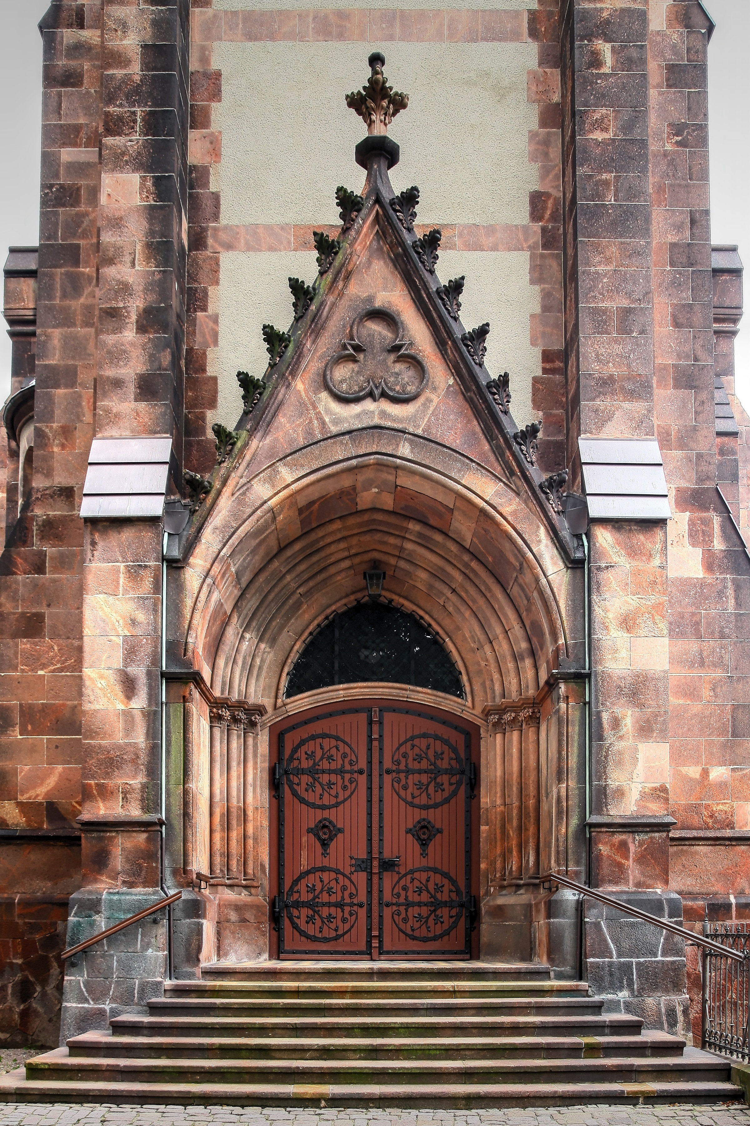 Die Martin-Luther-Kirche in Geringswalde 2010 - Kirchenportal auf der Westseite mit Wimperg